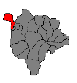 Bezirk Mattersburg